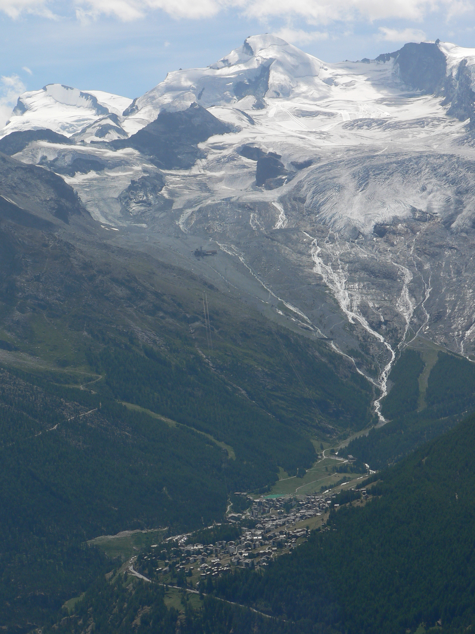 Saas-Fee, Swiss village